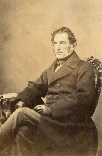 Retrato fotográfico del jurisconsulto y político argentino que fuera el 4º presidente de la República Argentina. Valentín Alsina posa sentado en un retrato de media pierna, viste traje muy elegante, camisa blanca, corbata de moño y calza guantes de cuero. El retrato se encuentra retocado en la patilla y el cabello.